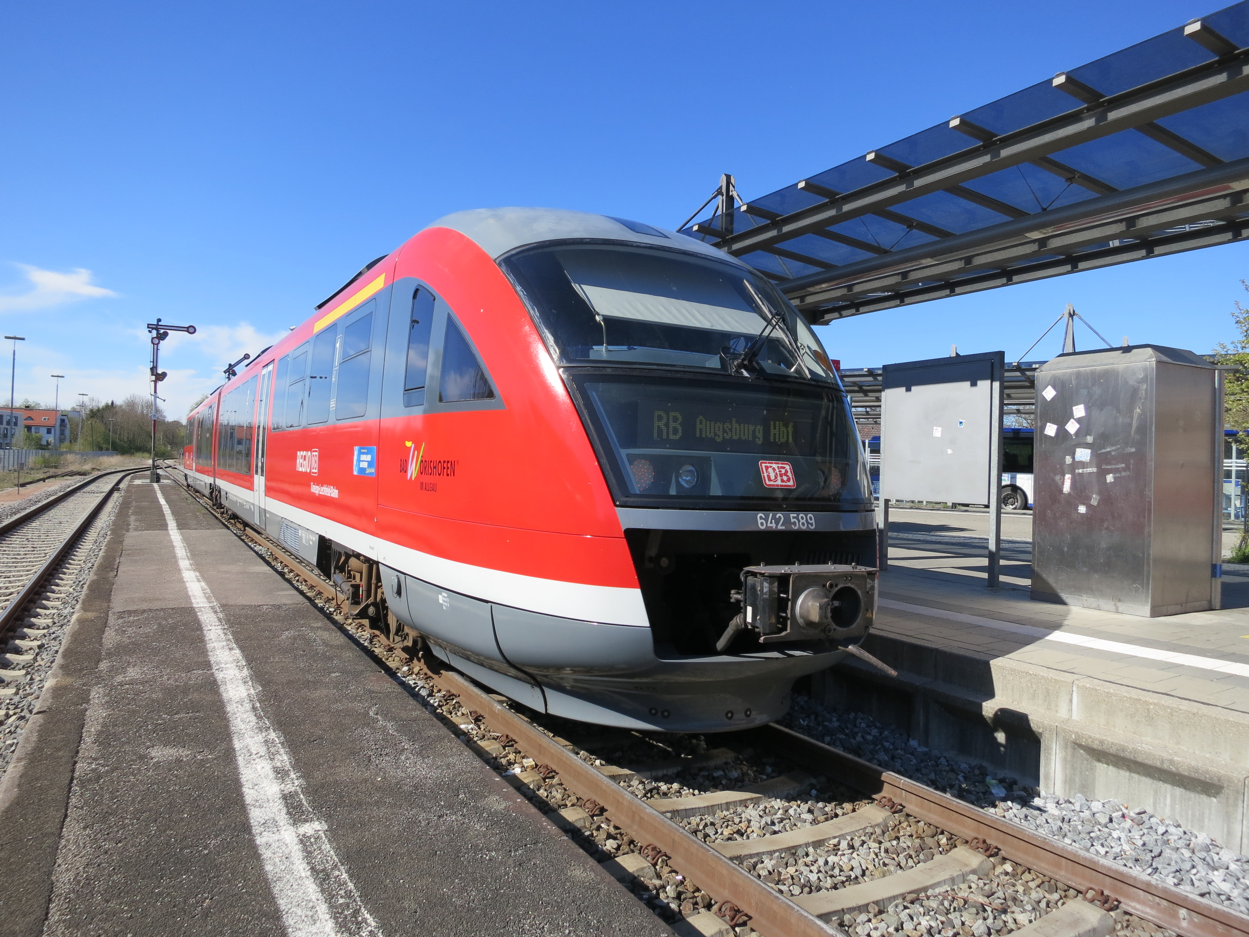 Dieseltriebwagen der 642 589 (Desiro) am Hausbahnsteig des Bahnhofs Landsberg (Lech)